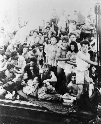 אוניית המעפילים 'ברכה פולד', נקראה על שמה של לוחמת הפלמ"ח ברכה פולד, שנהרגה במרץ 1946, בעת שנלחמה ב'ליל וינגיט'. פולד יצאה בתאריך 16.10.1946 מאזור מנטפונטו שבדרום איטליה, עם כ-600 מעפילים. בדרך, הצטרפו לאונייה עוד כ-180 מעפילים מאוניית 'אלברטינה' ובסה"כ הגיעו לישראל עם 819 מעפילים. בדרכם לישראל, נתקלו הנוסעים בקשיים ומסעם התארך מעבר למצופה וזאת בעקבות סערות ותקלות טכניות בספינה. כאשר הגיעה האונייה לאזור קפריסין, התגלתה על ידי מטוסי סיור של הבריטים ונגררה לחופי חיפה. בהגיעה לחיפה, בתאריך 22.10.1946, צולמה התמונה. מחיפה גורשו המעפילים על ידי אוניות בריטיות למחנה קאראולוס בקפריסין, שם שהו עד אפריל 1948.